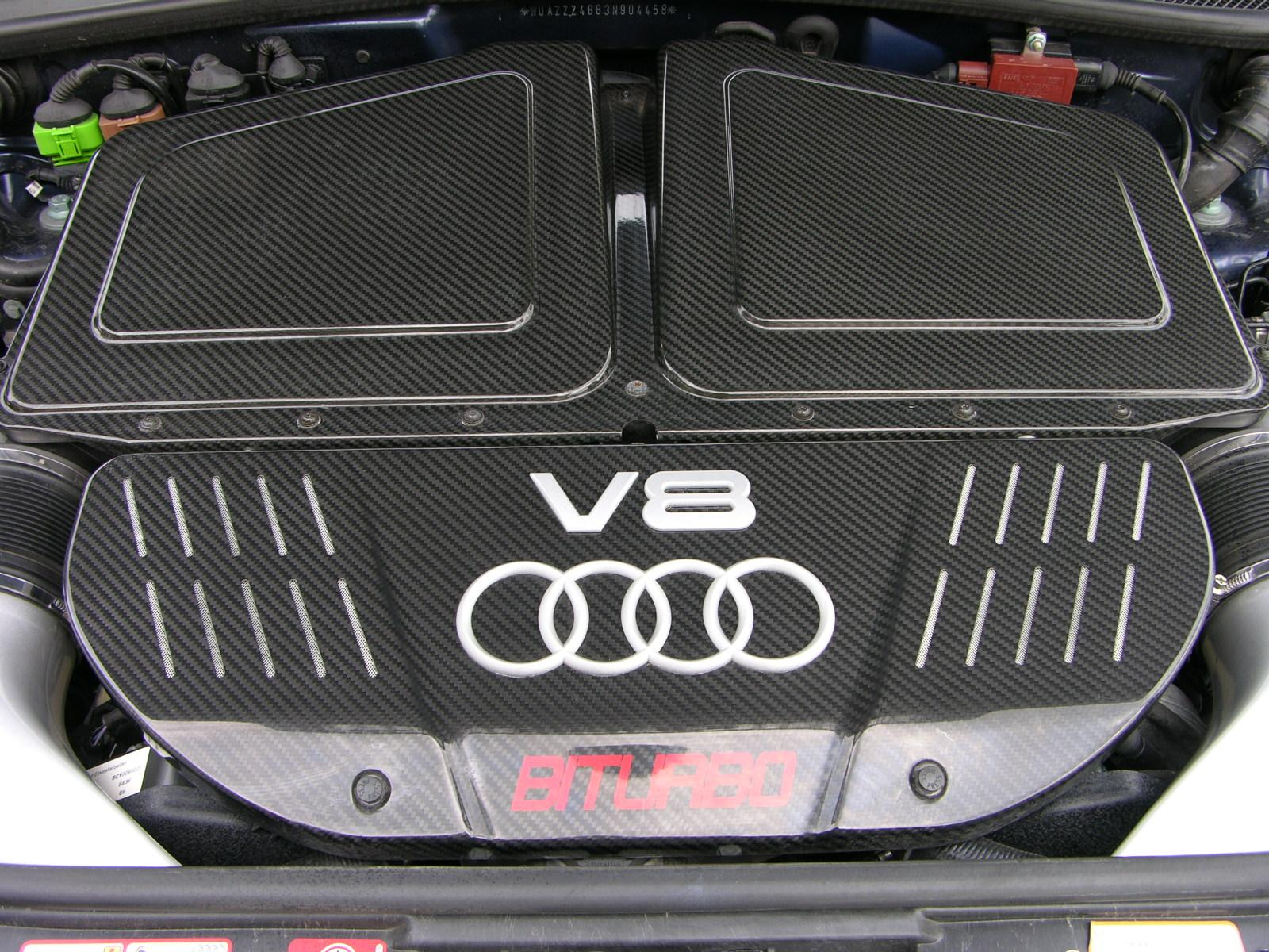 Audi RS6 engine